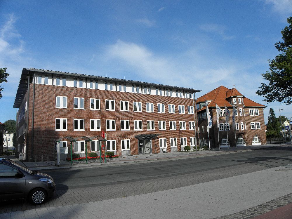 Die Westseite mit Bushaltestelle des Rathauses in Cuxhaven